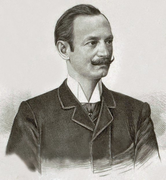 Theodor Ritter von Flondor, Komponist, um 1900